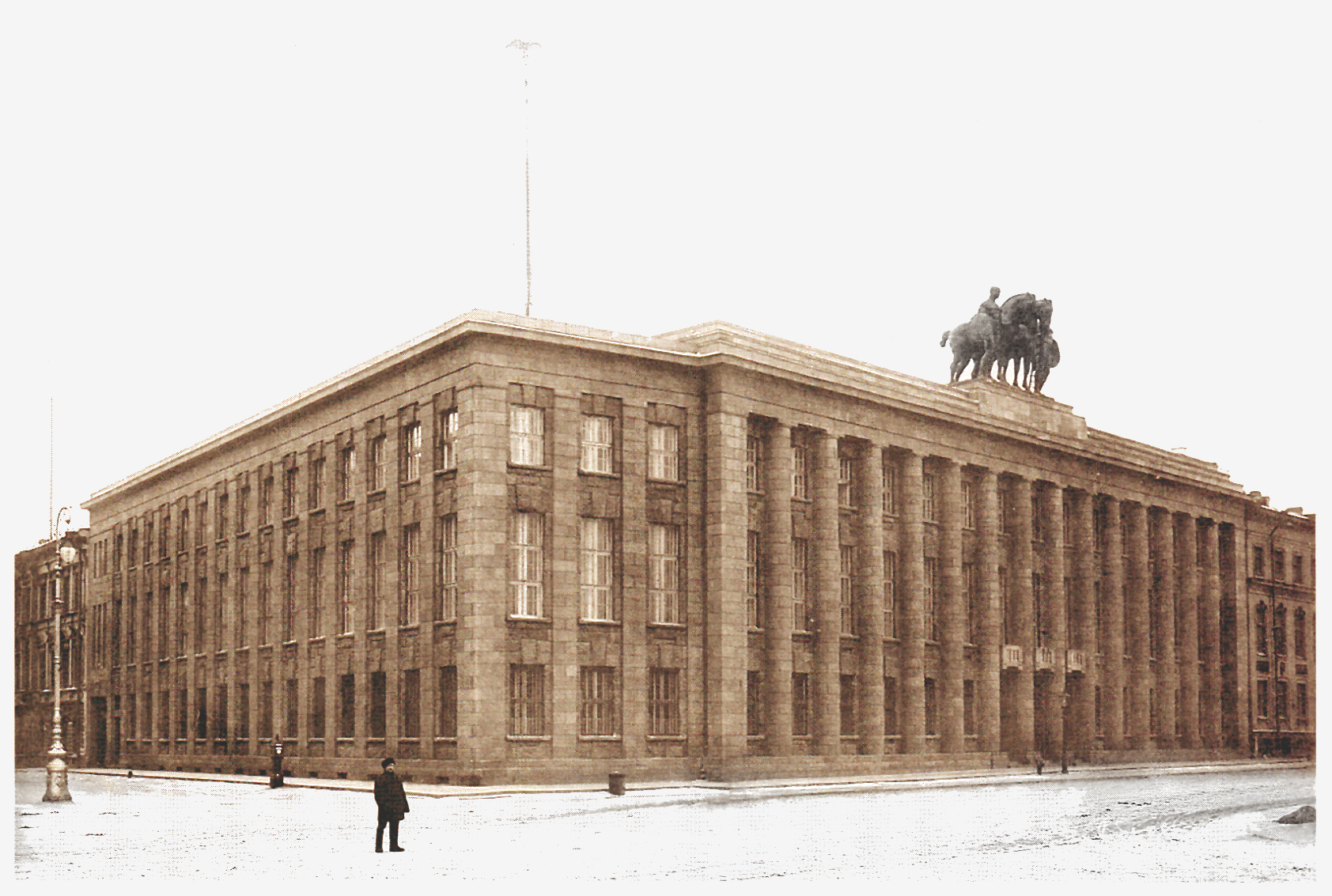 Изображение первоначального вида (не позже 1914 года) Германского посольства в Петербурге.